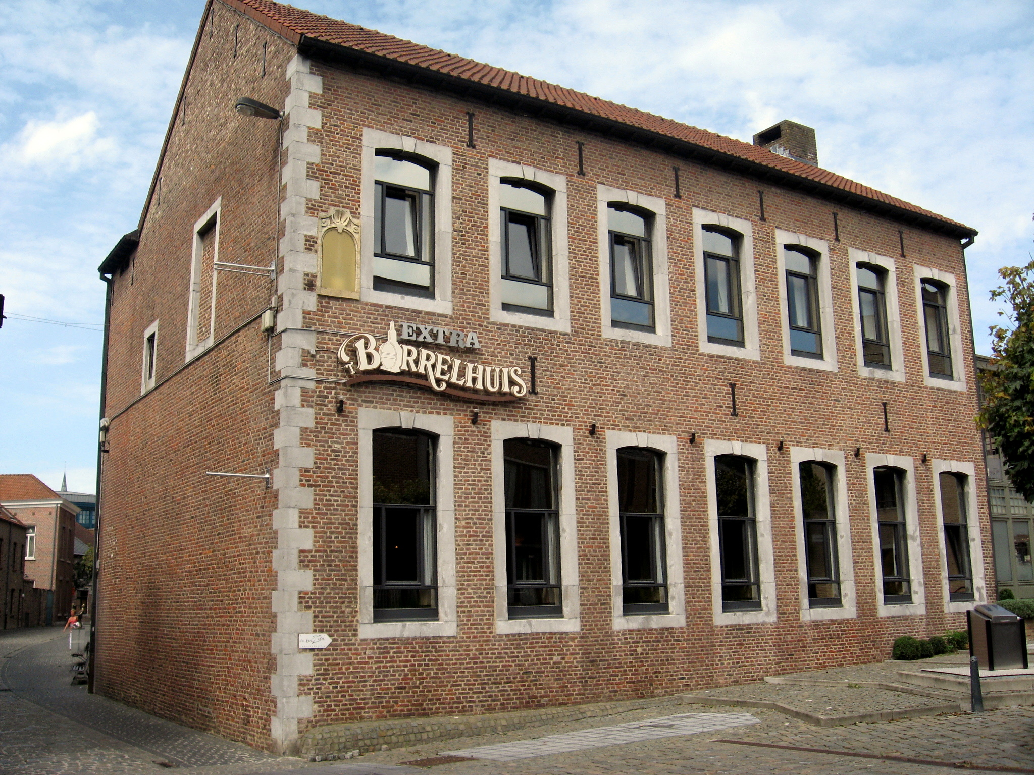 Borrelhuis in de oostelijke vleugel van het voormalige Witte nonnenklooster in Hasselt